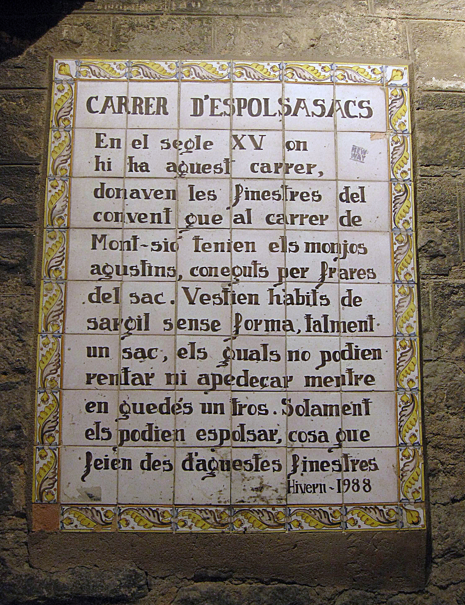 Carrer d'Espolsa-sacs. Passatge Espolsa-sacs (Barcelona)